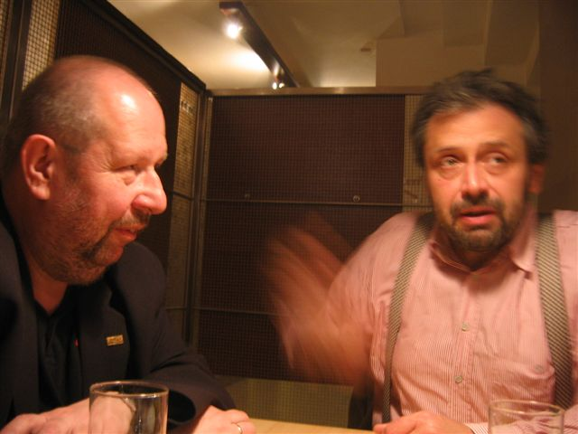 Leszek Engelking and Vaclav Burian